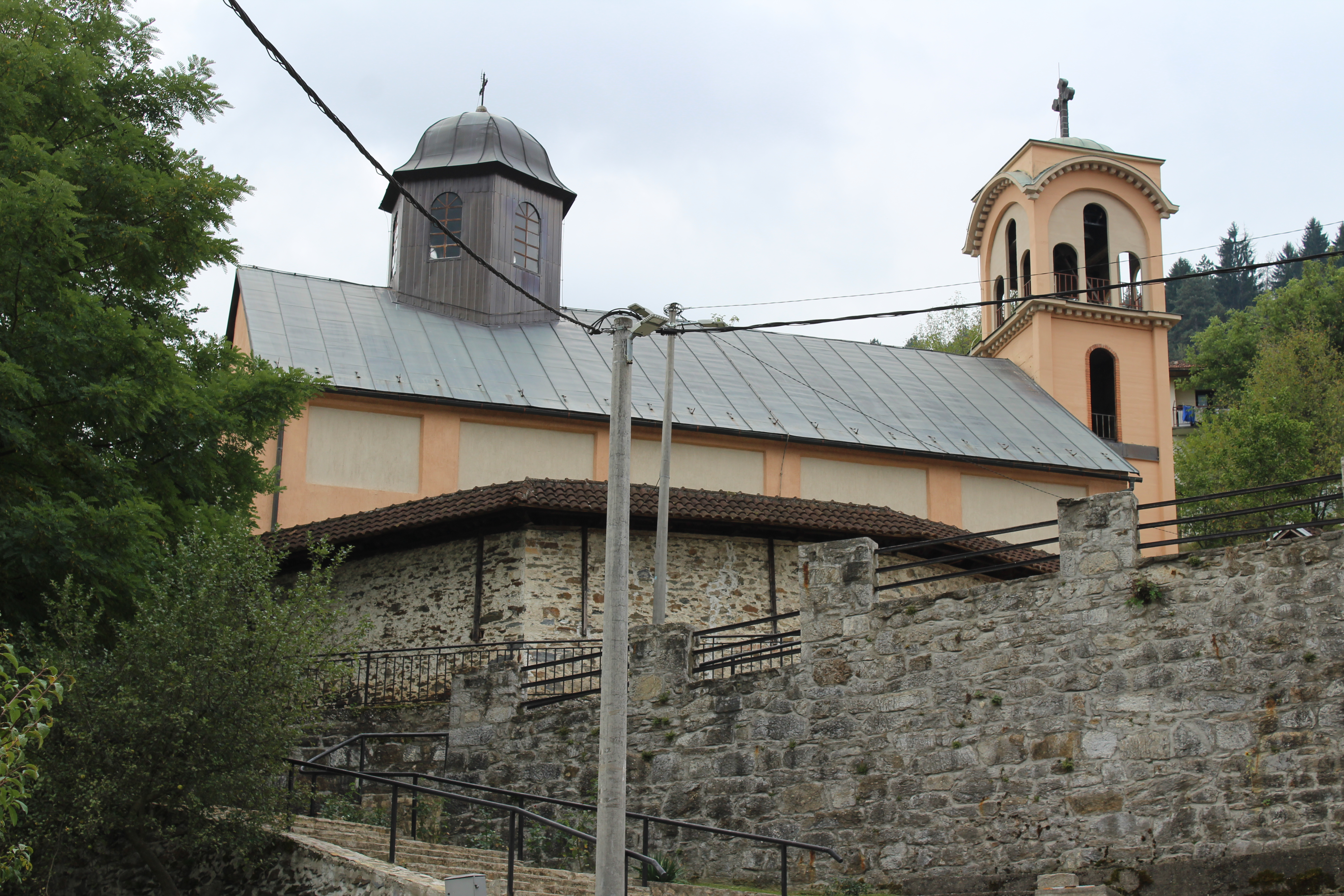 Црква св. Николе са покретном имовином, Фоча ID добра: NKD729